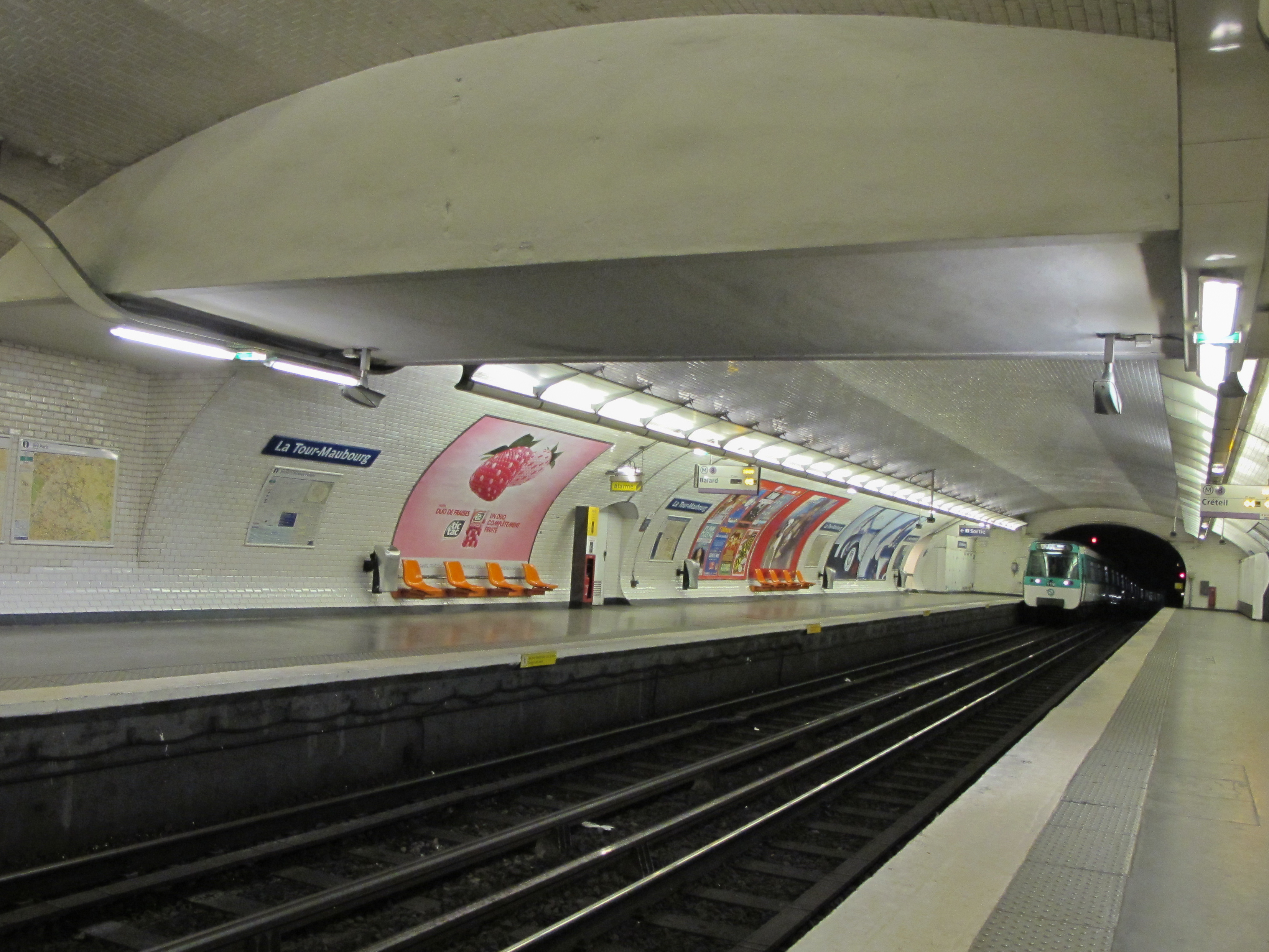 Station de métro La Tour Maubourg, métro de Paris, France